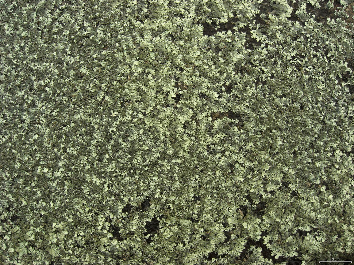 Xanthoparmelia plittii etc. 20100311.9 US, GA, near Augusta, Heggie's Rock